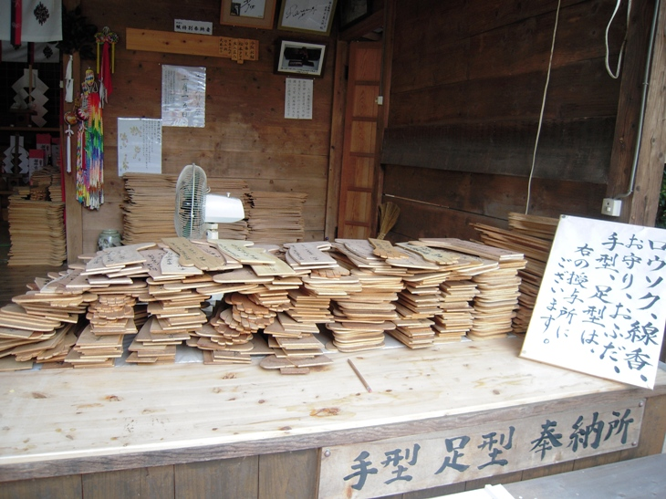 熊本県上益城郡嘉島町の甲斐神社（足手荒神）社殿